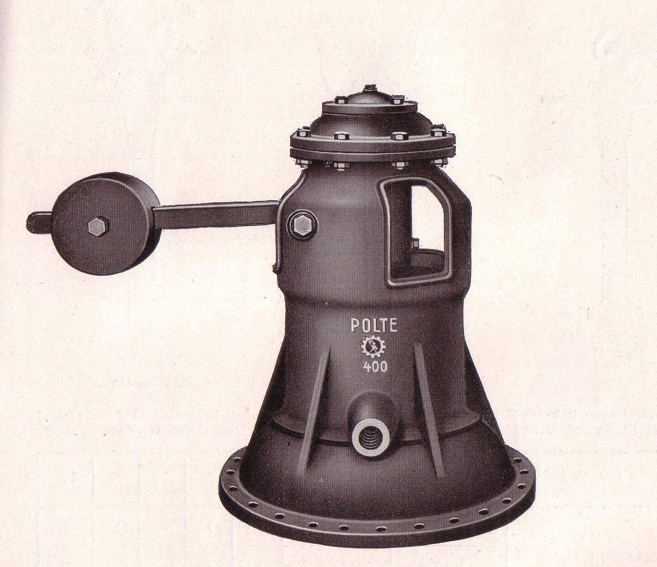 Entlüftungsventil der Polte-Werke